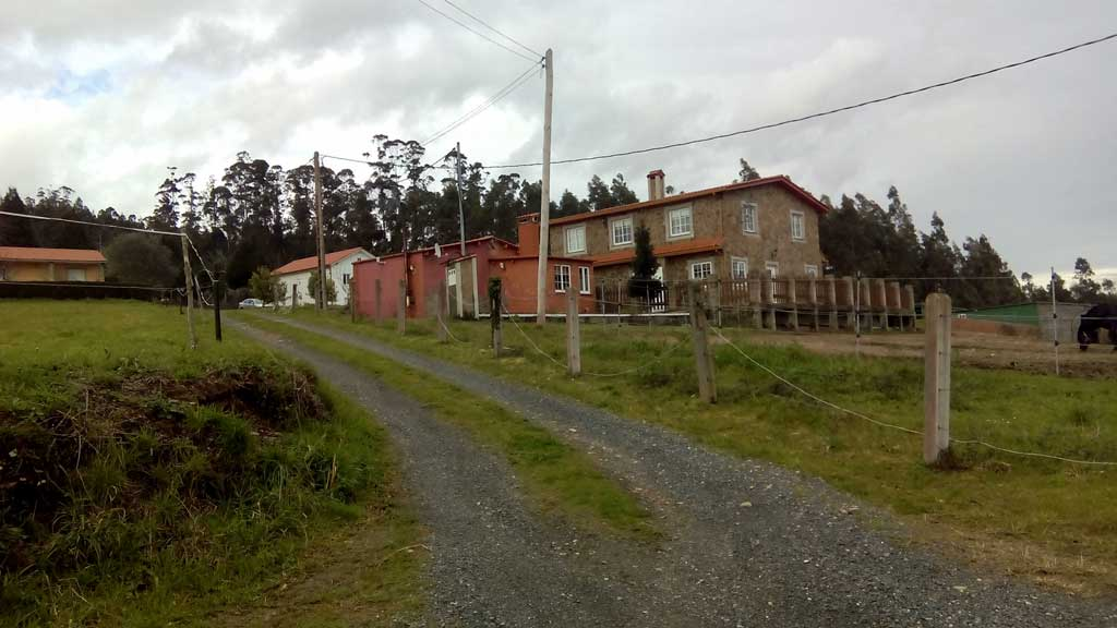 Vista dos Loureiros, Pedroso, Narón.